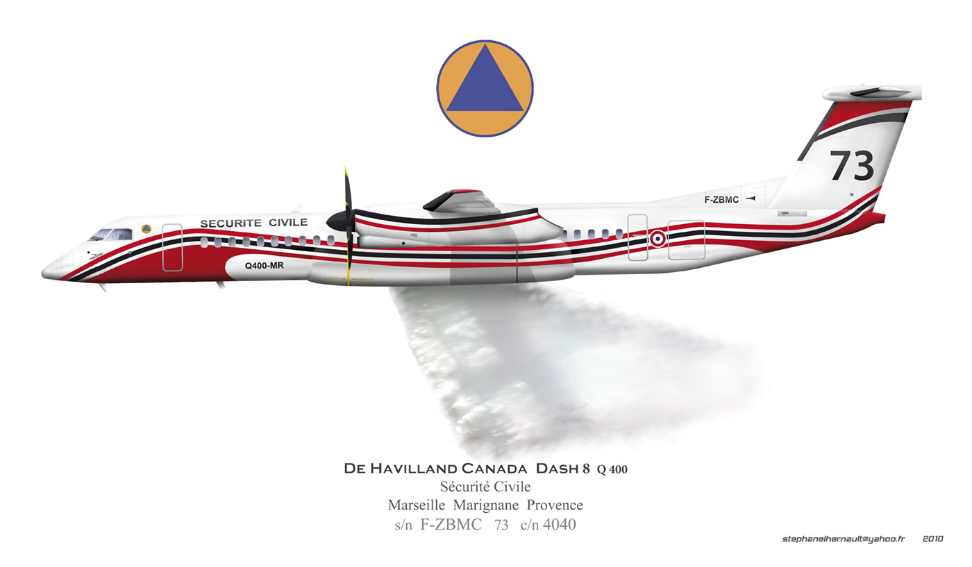 De Havilland Dash8 Q400 Sécurité civile France Bombardier d'eau